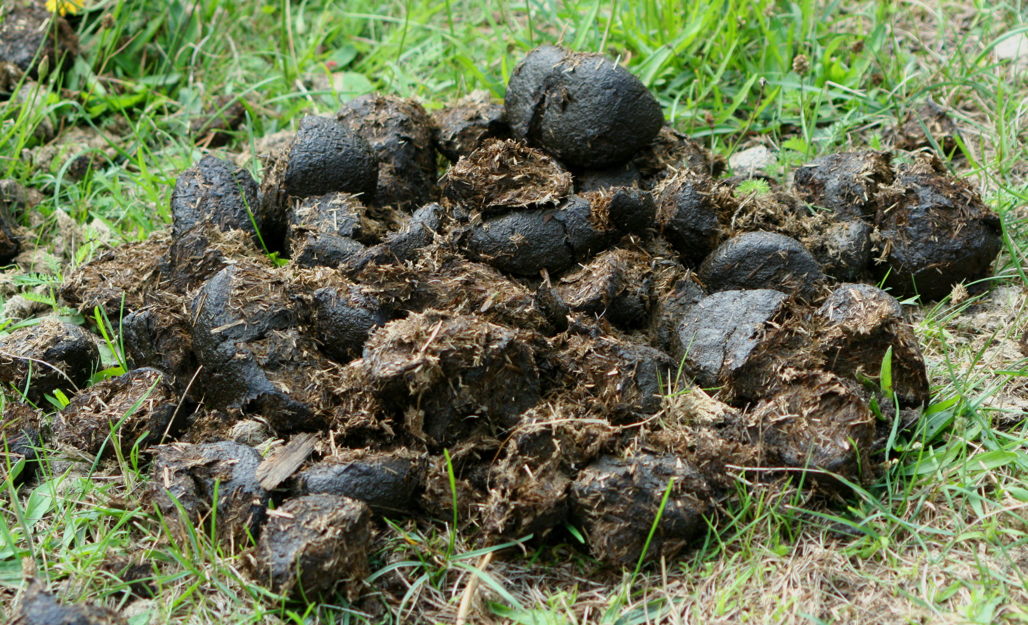 Du bon manger pour les tits caves!!!